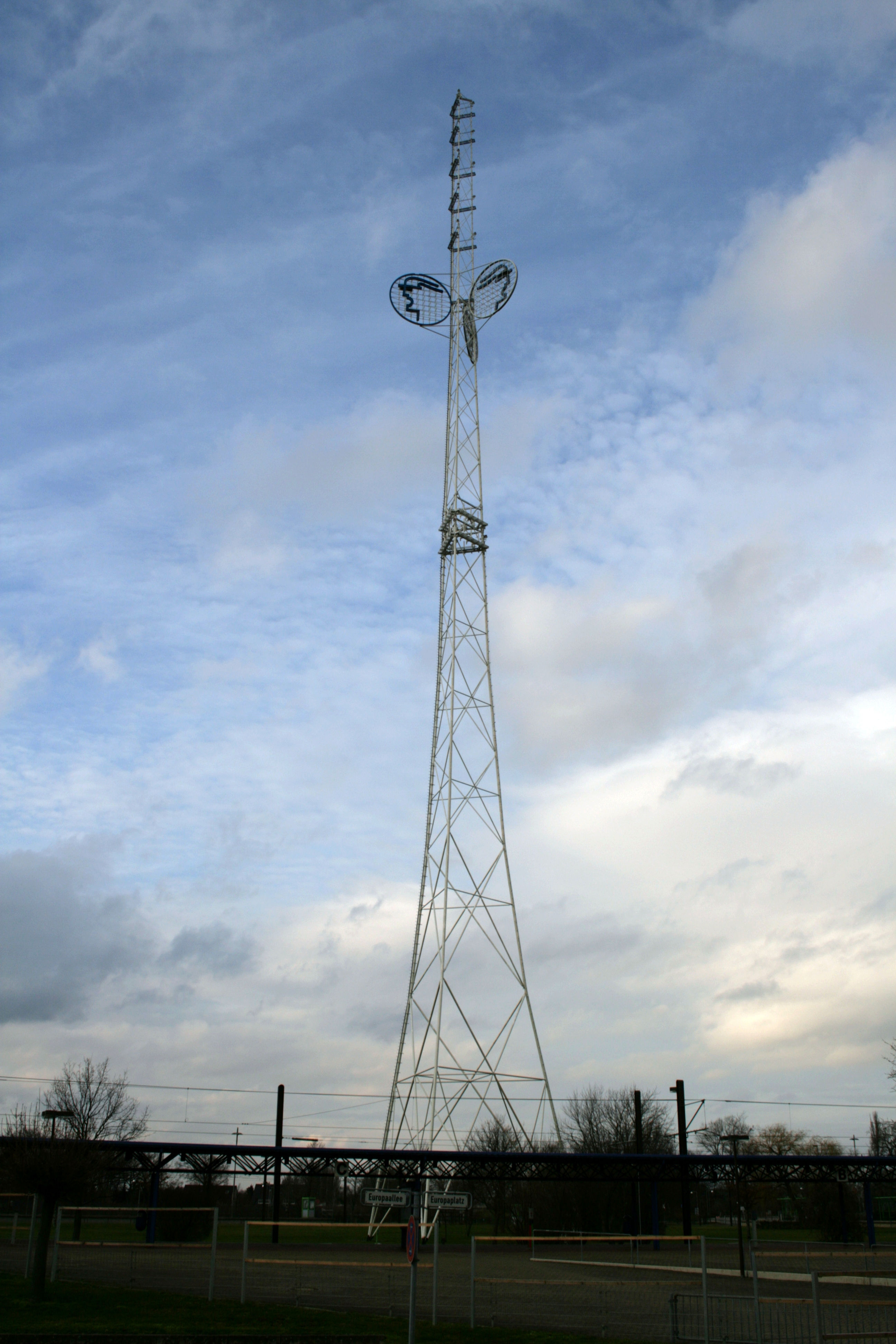 Mannesmannturm in Hannover vor dem Eingang "Nord 1" des Messegeländes